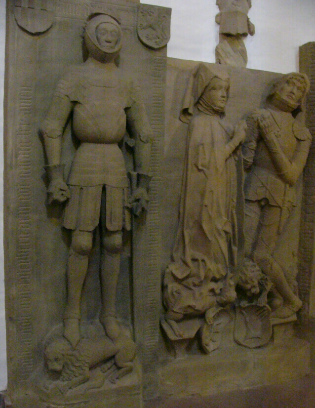 Rosenberger Grabmäler in der Kirche von Boxberg